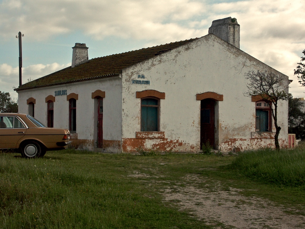 Tipo: PN / Paragem Local: Sarilhos Ramal do Montijo, PK 23 Data e hora: 11 de Março de 2006 17h01 situada junto a uma rotunda onde confluem a EN 5, EN 11 e EN 252.